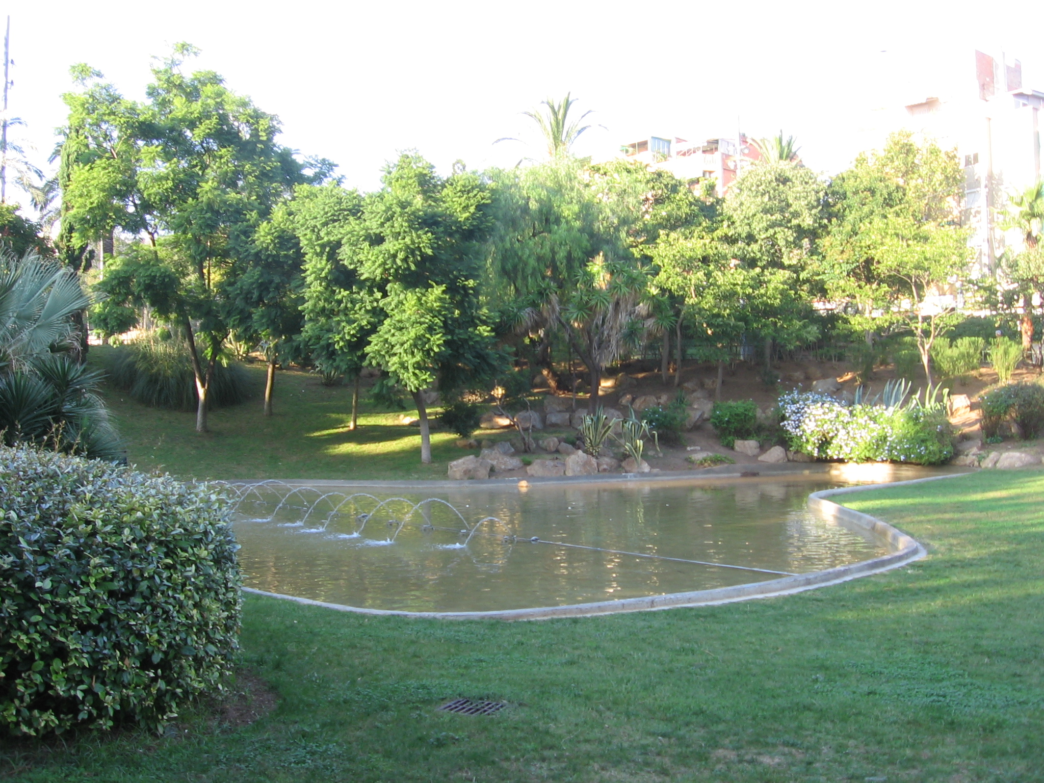 Parque de la Guineueta.